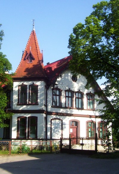 Ośrodek Zdrowia w Orzyszu